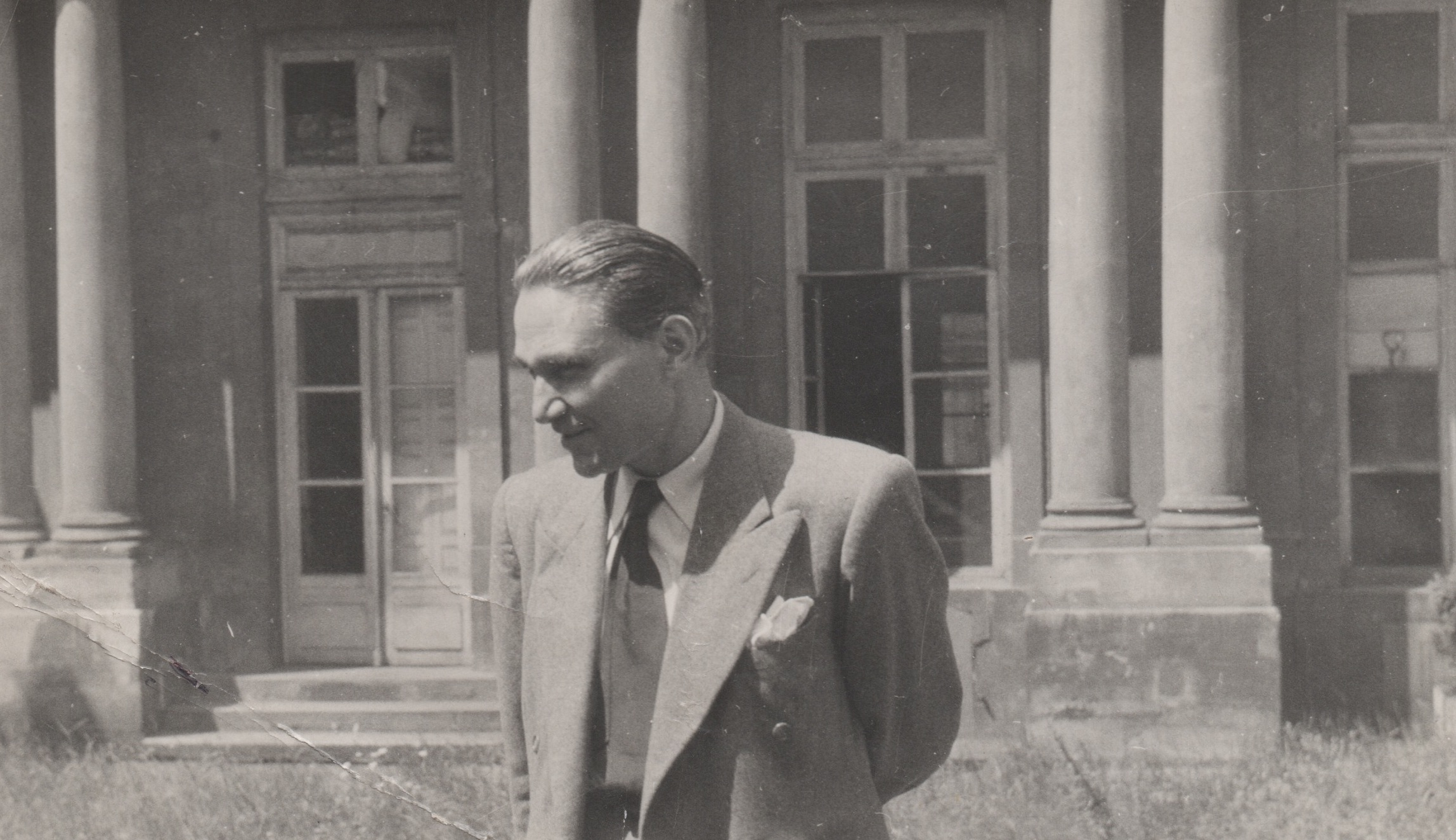 Parigi, anni Cinquanta. Alberto Tallone di fronte all'Hôtel de Sagonne